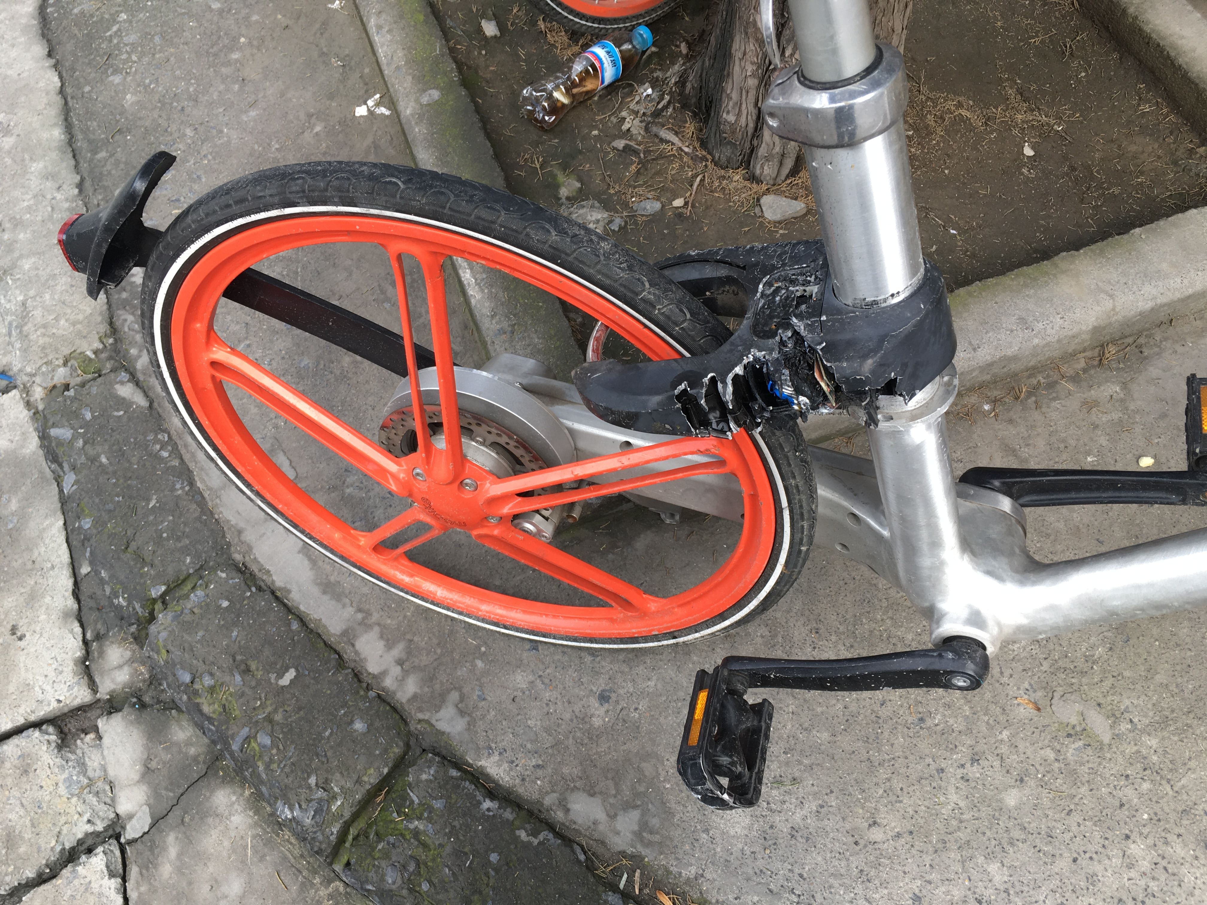 一部智能锁被暴力破坏的摩拜单车